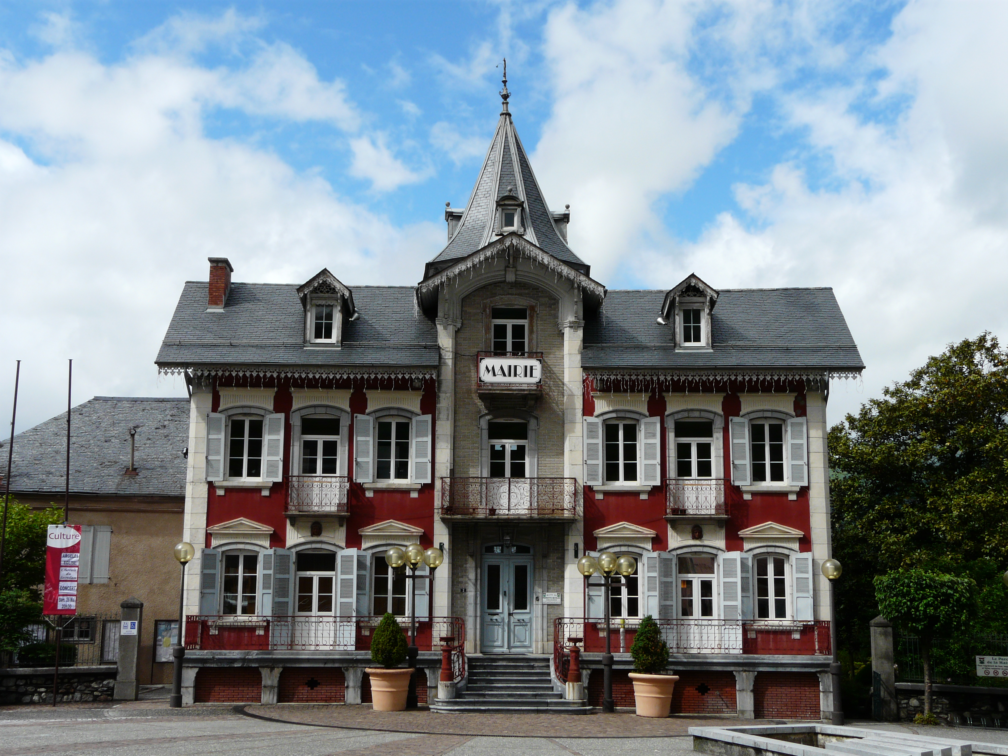 La mairie de Pierrefitte-Nestalas, Hautes-Pyrénées, France.